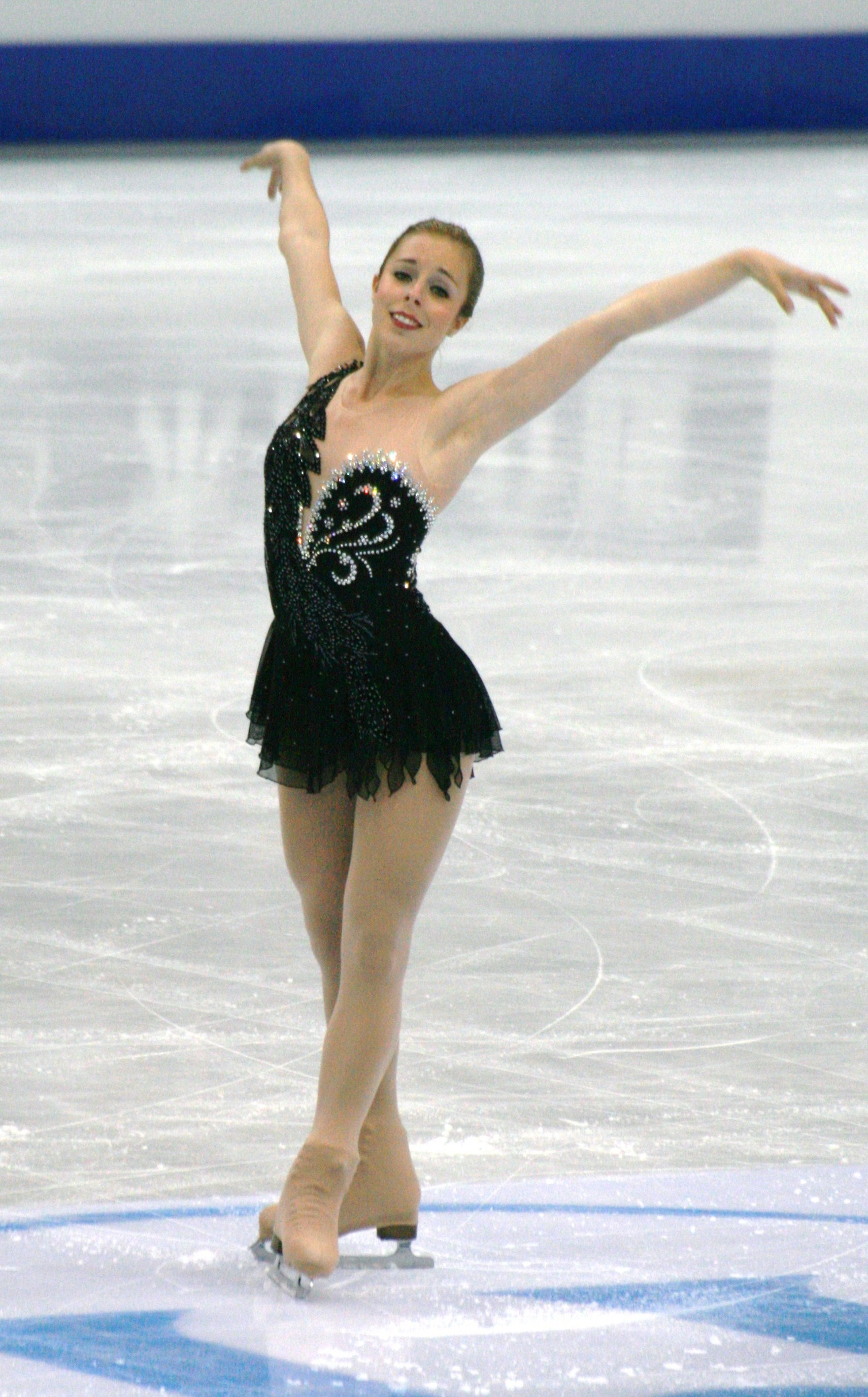 Эшли Вагнер (США) на чемпионате мира по фигурному катанию 2012